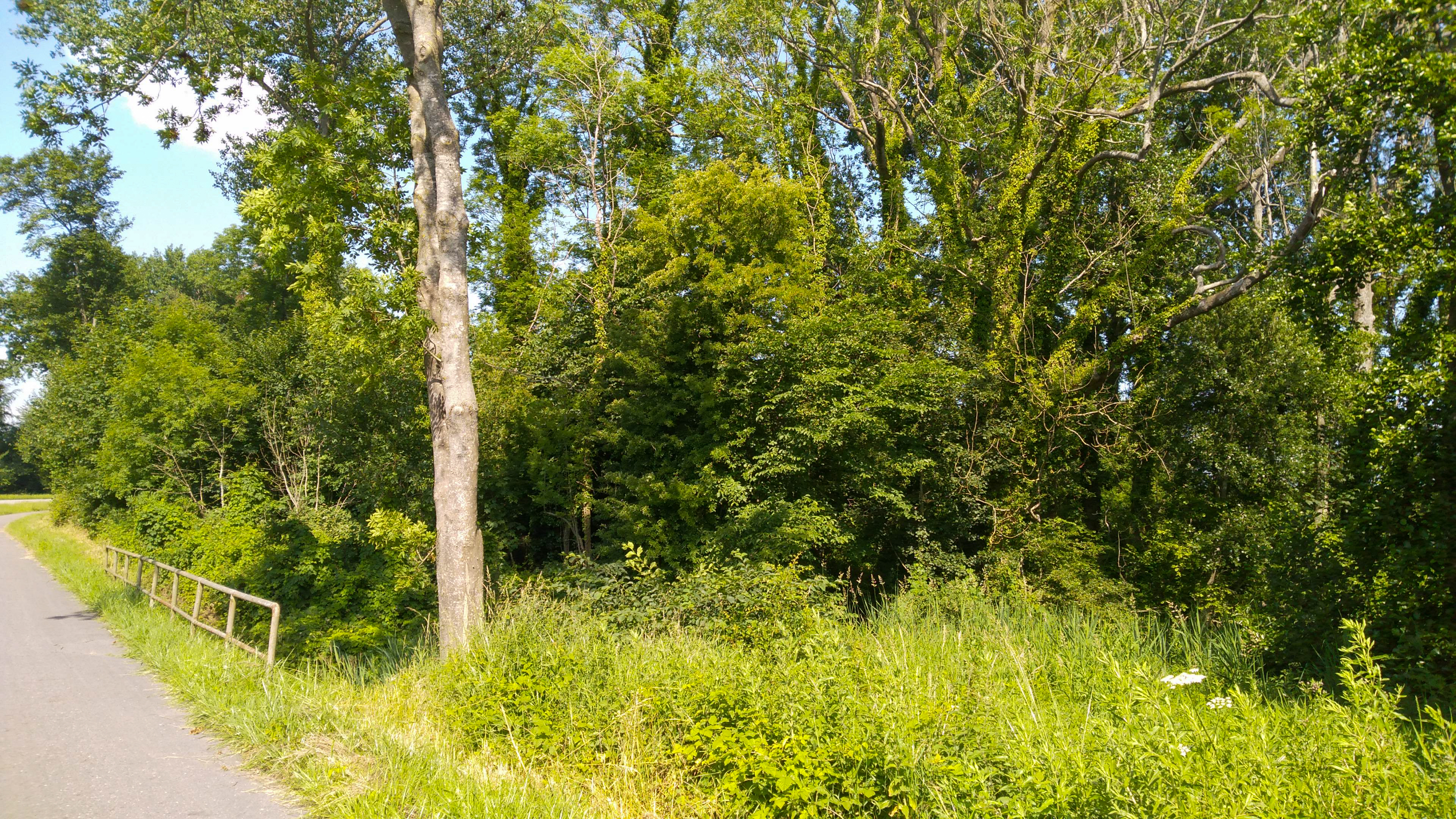 FFH-Gebiet Küstenbereiche der Flensburger Förde von Flensburg bis Geltinger Birk: Unterführung der Hunau unter der B199 in Hunhoi. Grenze des Geltungsbereich des Managementplanes des FFH-Teilgebietes "Gräverdieck-Hunhoi"